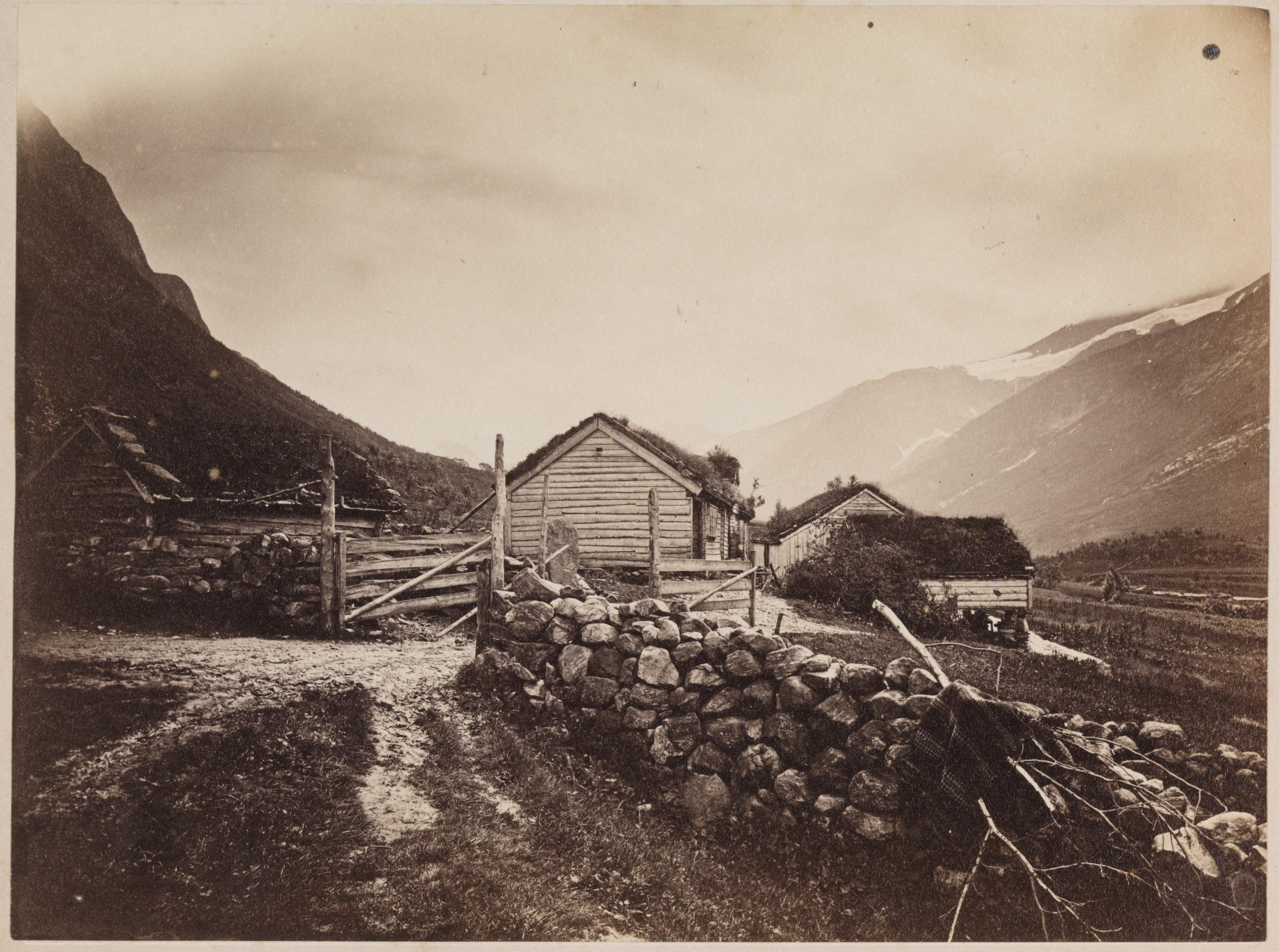 Bildet er hentet fra Nasjonalbibliotekets bildesamling. Anmerkninger til bildet var: Del av serien "Norske Prospecter" Straumgjerde, Sykkylven, Møre og Romsdal